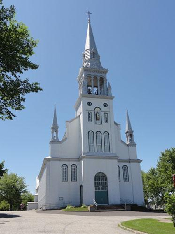 Église-Saint-Philémon